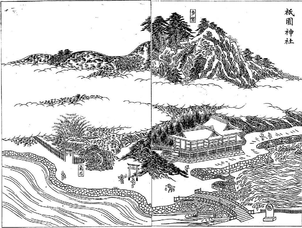 三国名勝図会第三巻に掲載されている八坂神社（別名：祇園社）の江戸期の絵図。